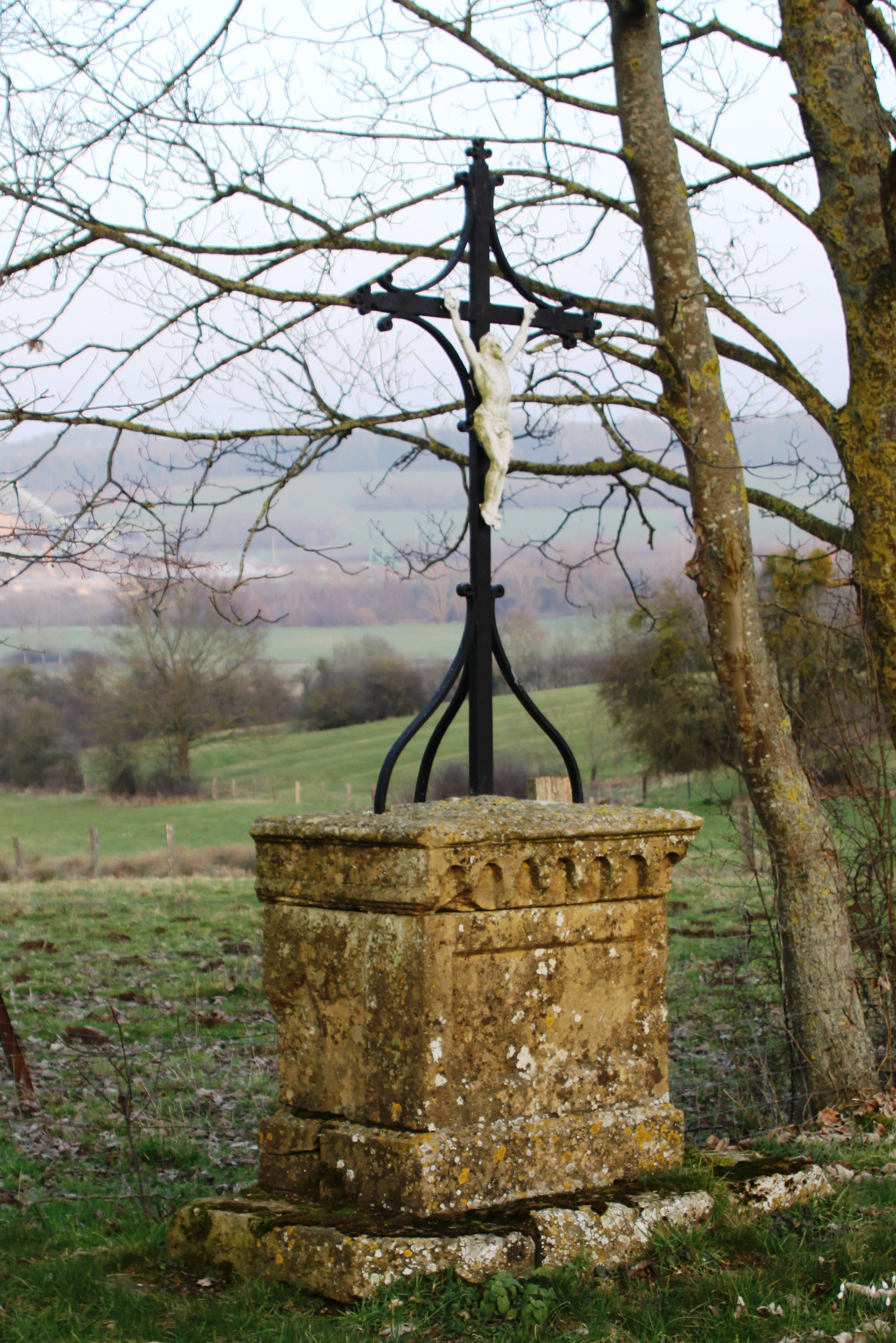 Croix du parjure entre Harnoncourt et Montquintin